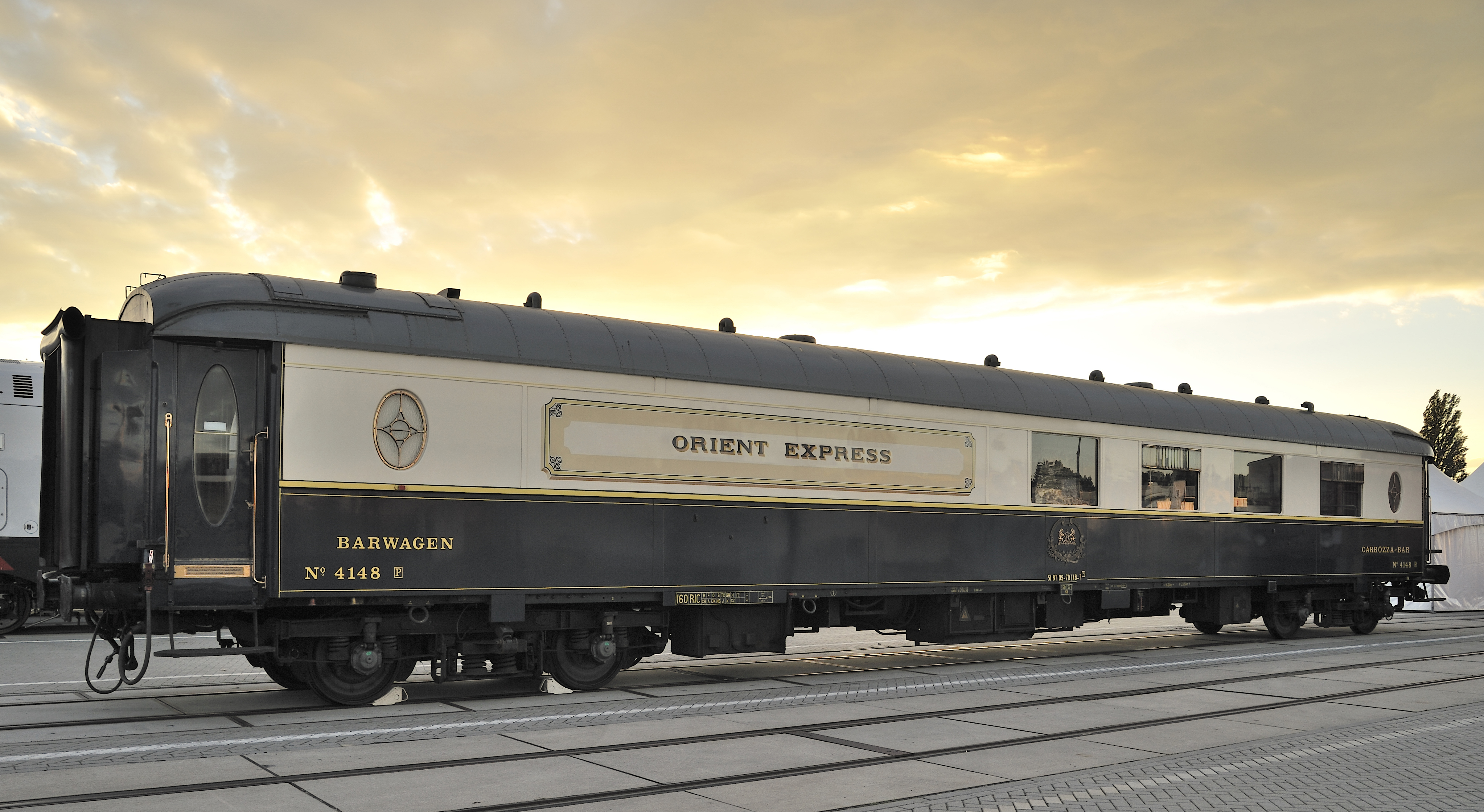 Vue extérieure de l'Orient Express SNCF